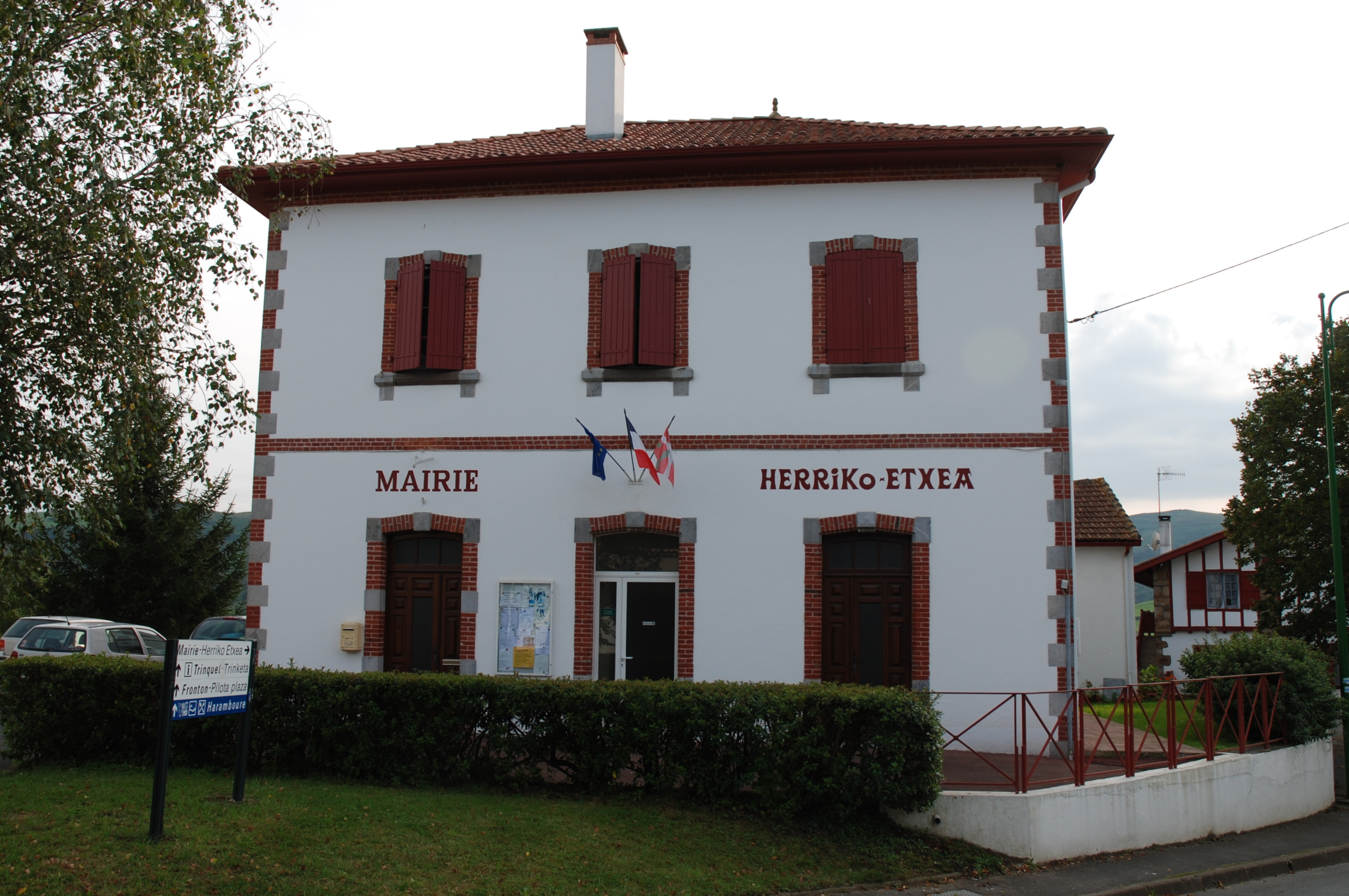 Isturits, la mairie. / Izturitzeko Herriko Etxea.